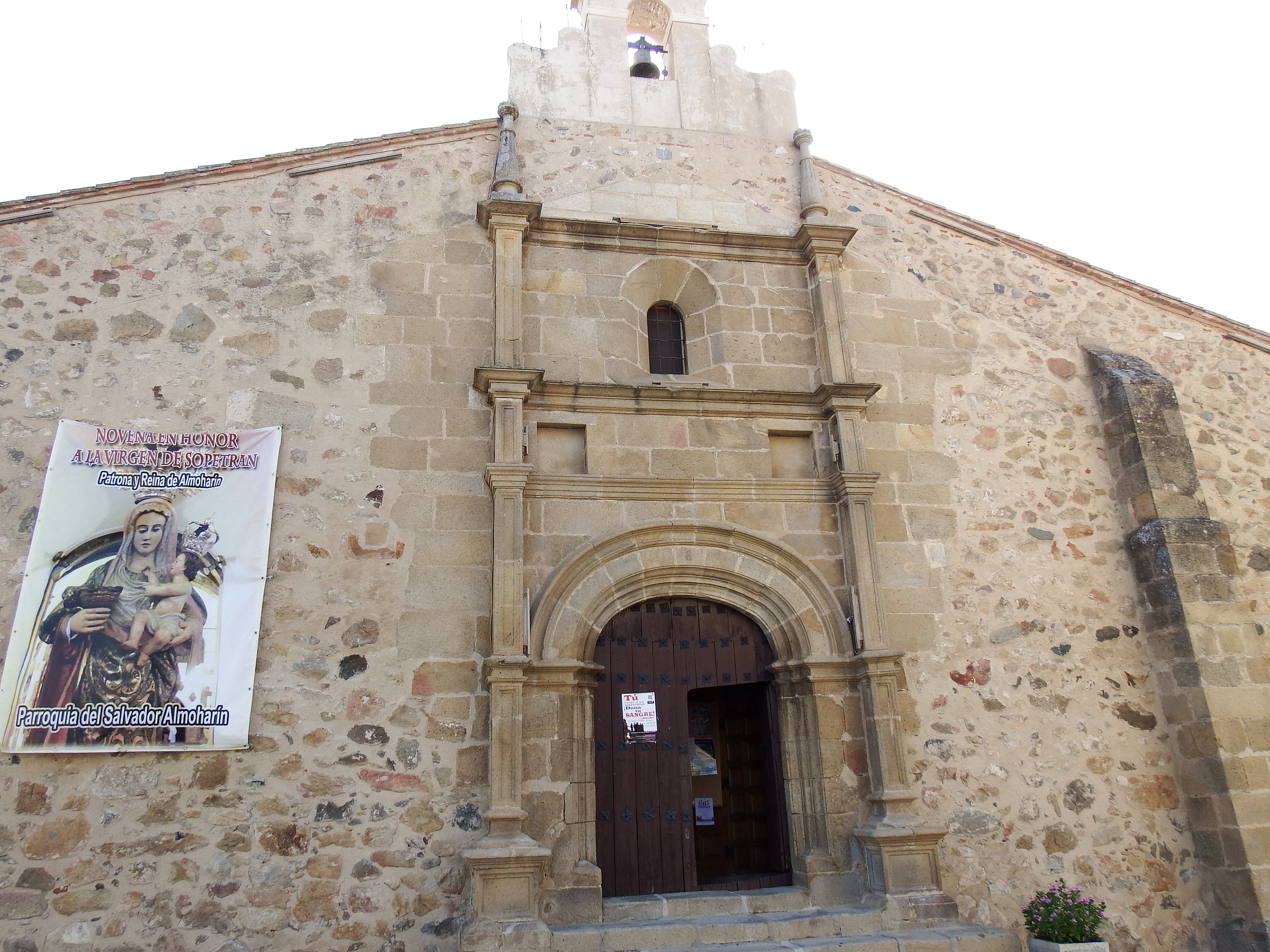 Almoharín